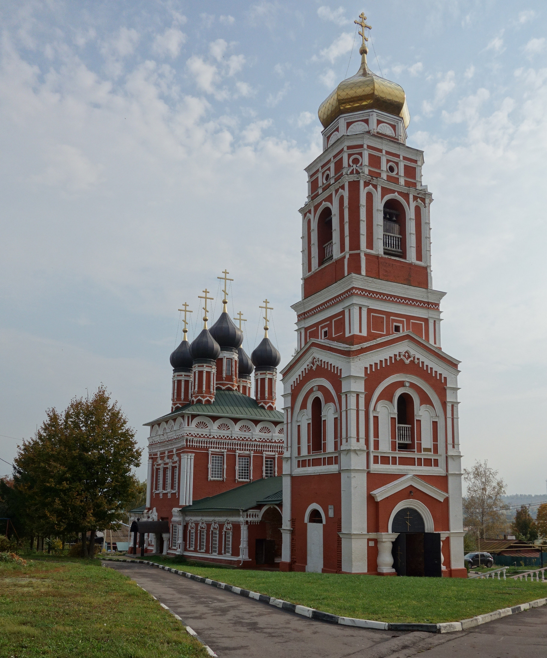 Церковь Троицкая: улица Красная горка, 1, Болхов, Болховский район, Орловская область